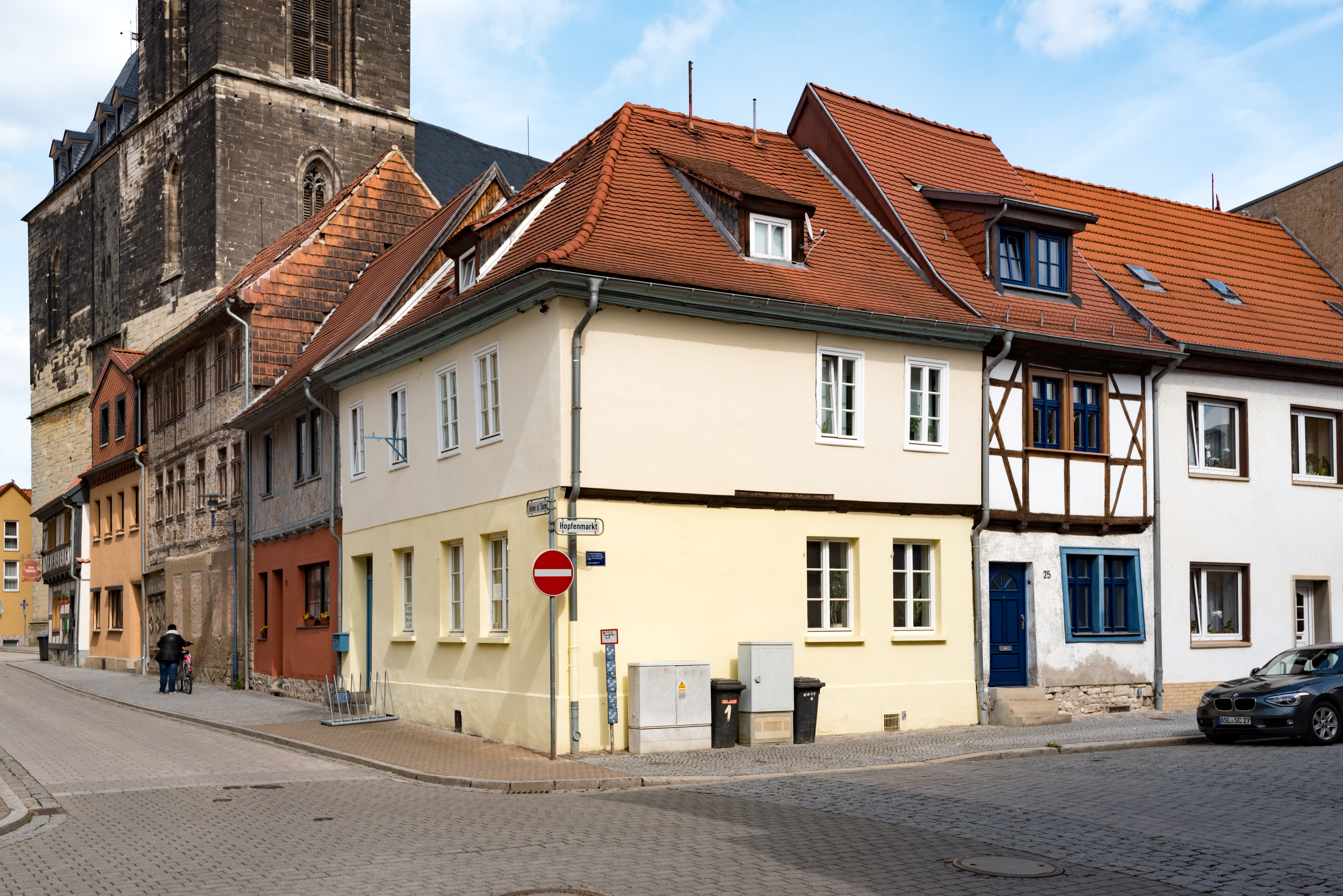 Aschersleben, Hinter dem Turm 20